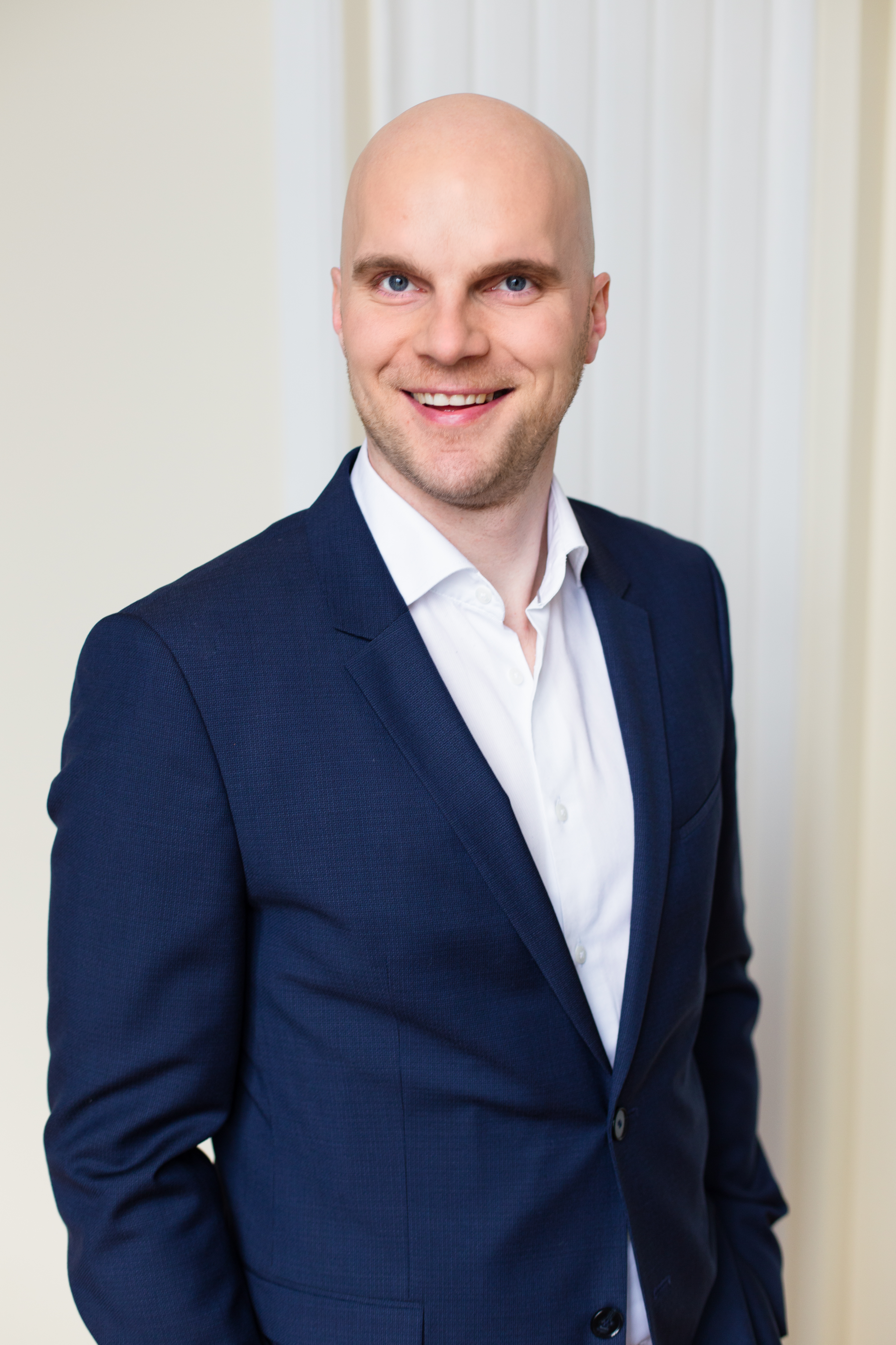 Juko-Mart Kõlar